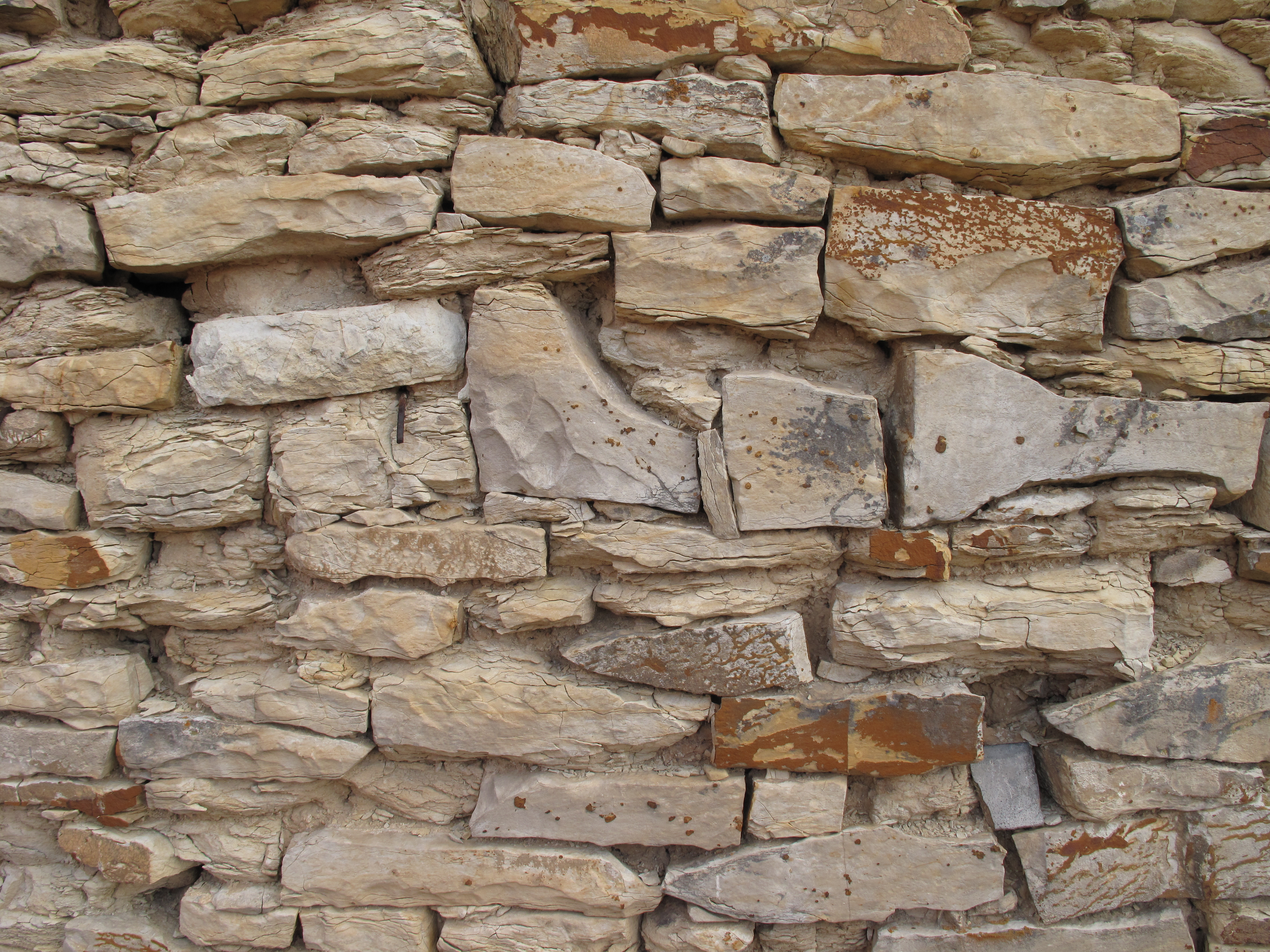 Zdivo v Pohořicích. Okres Litoměřice, Česká republika.